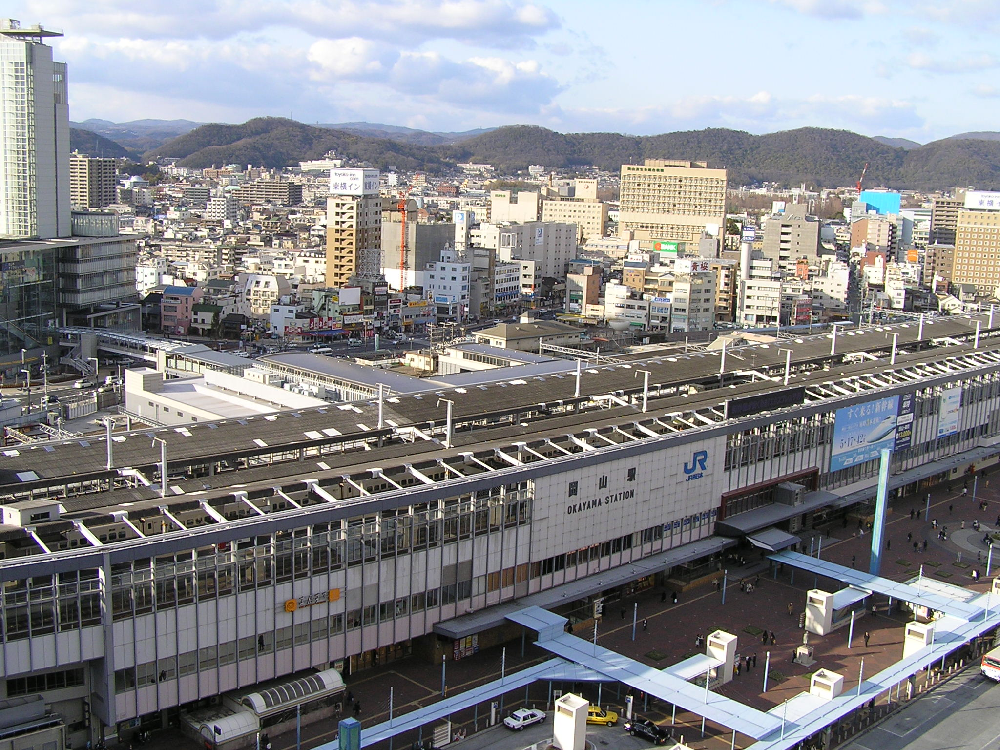 Okayama Station